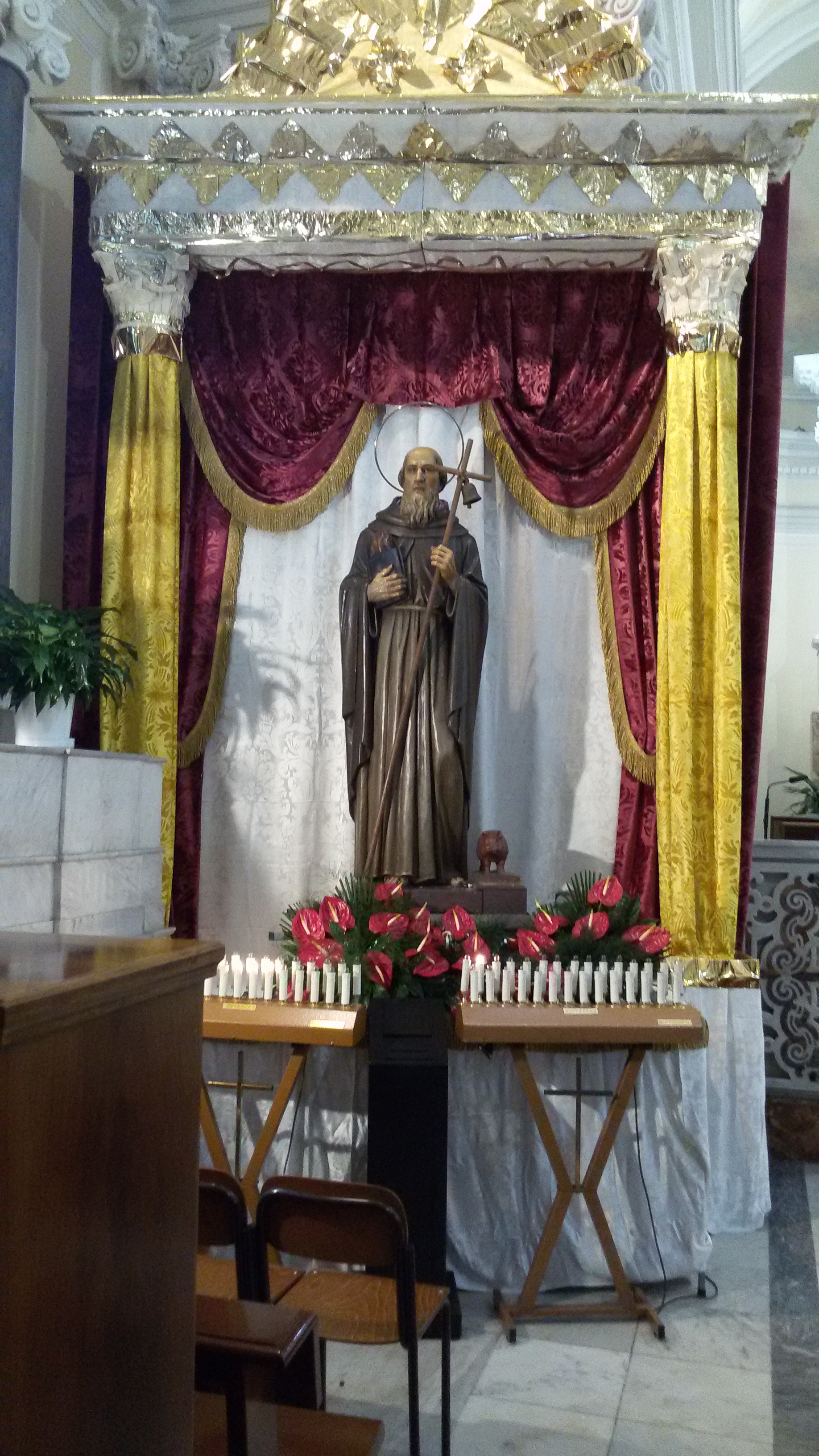 Trono di Sant'Antonio Abate nell'omonimo paese, in provincia di Napoli. Licenza d'uso Copyright Emmanuele Fattoruso 2015.